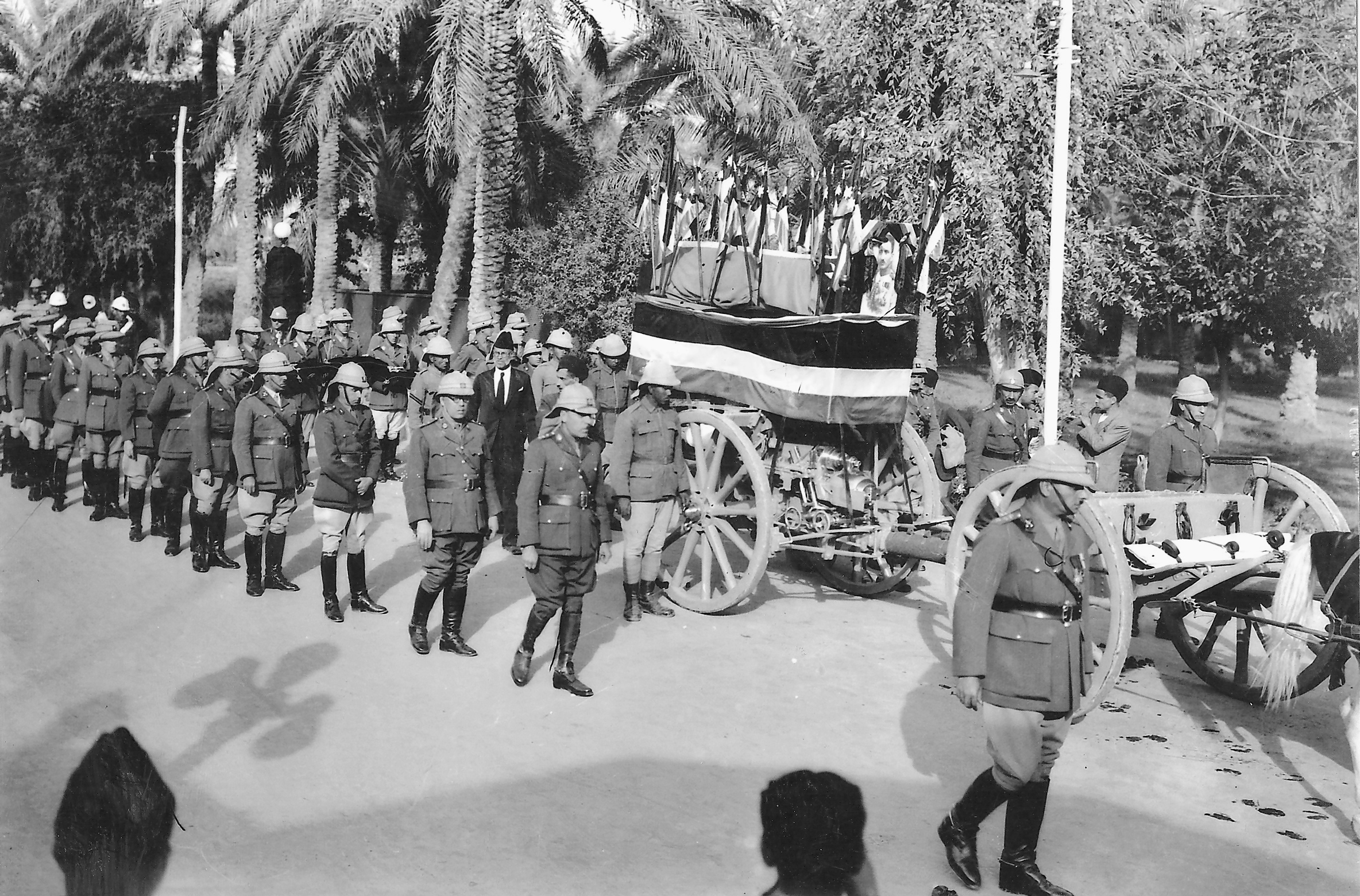 تشييع جنازة الملك غازي في موكب مهيب ودفنت رفاته في الأعظمية في المقبرة الملكية. وأقيم لهُ تأبين وأربعينية في يوم 14 أيار/مايو 1939